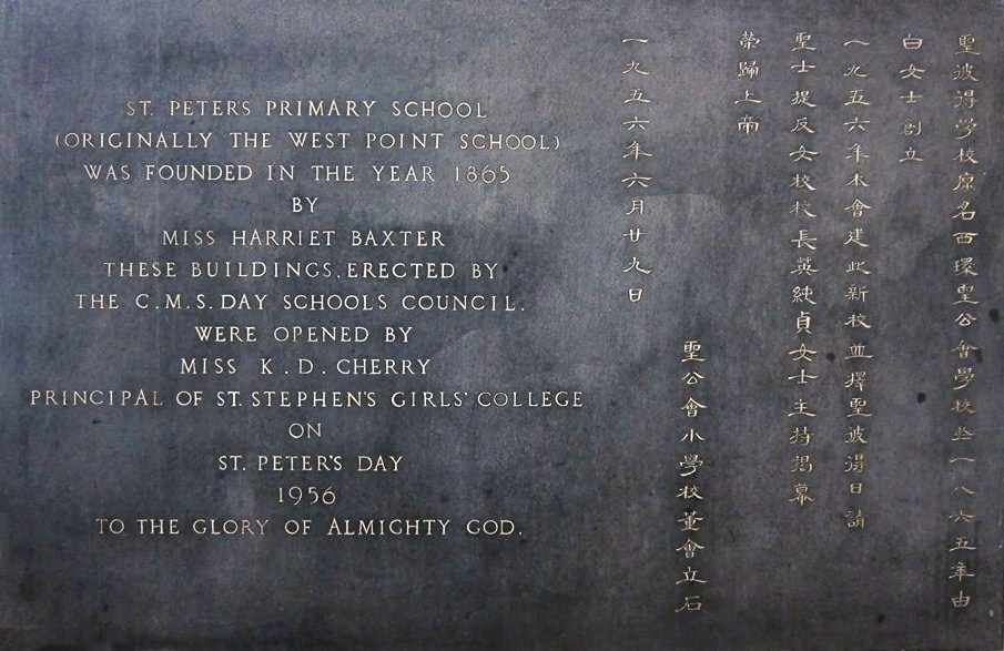 聖公會聖彼得小學石碑 山道88號校舍